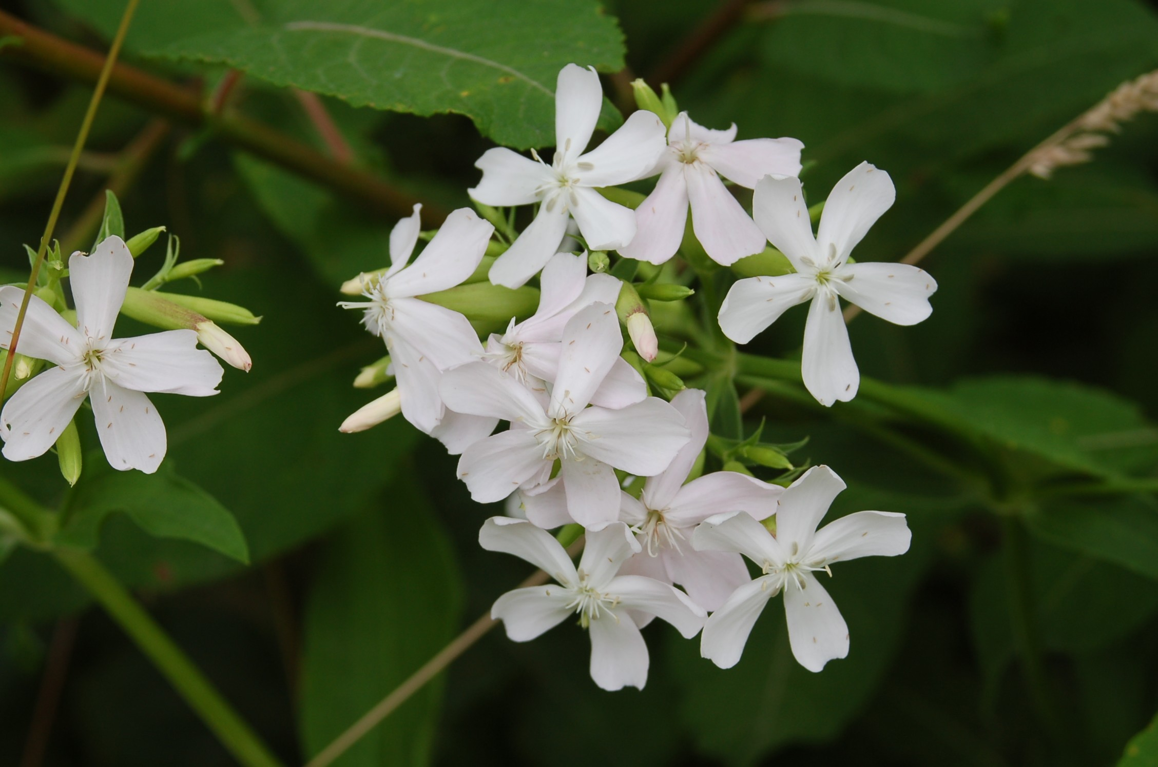 Blütenstand des Gemeinen Seifenkrauts, dessen Wurzeln früher zur Seifenherstellung benutzt wurden